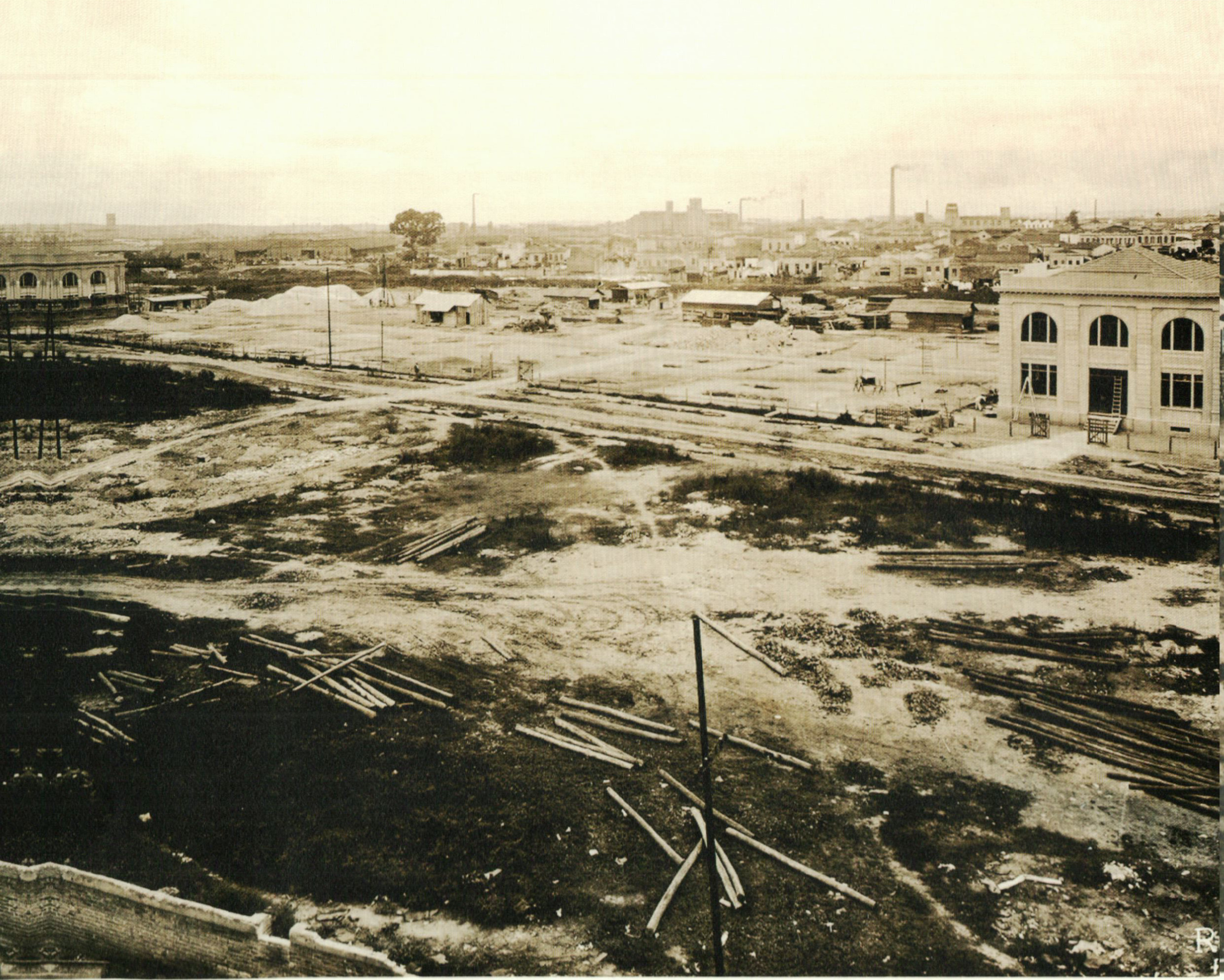 Foto histórica tirada durante a construção do mercadão municipal na década de 20.